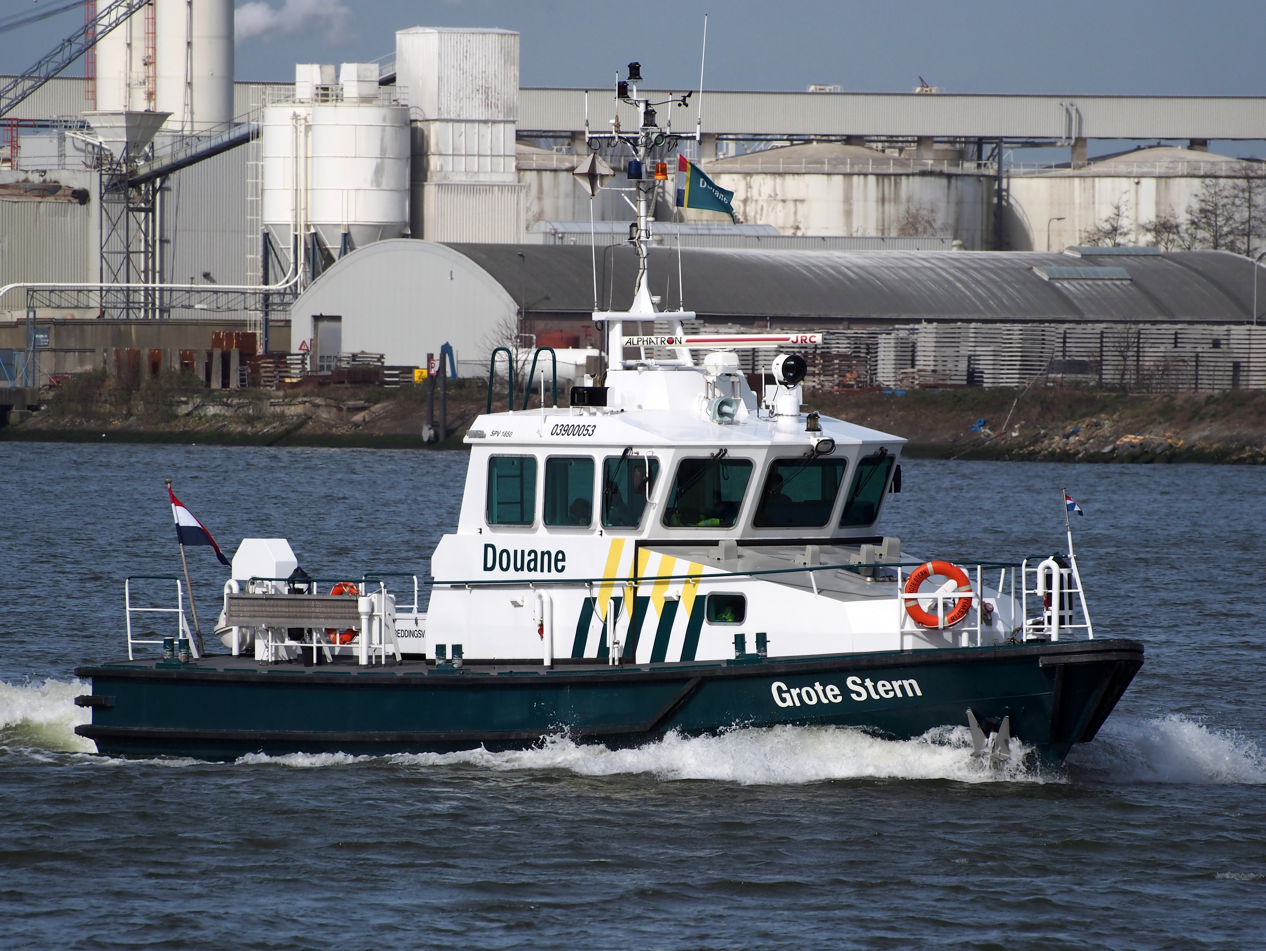 Grote Stern - ENI 03900053, Het Scheur, Port of Rotterdam.